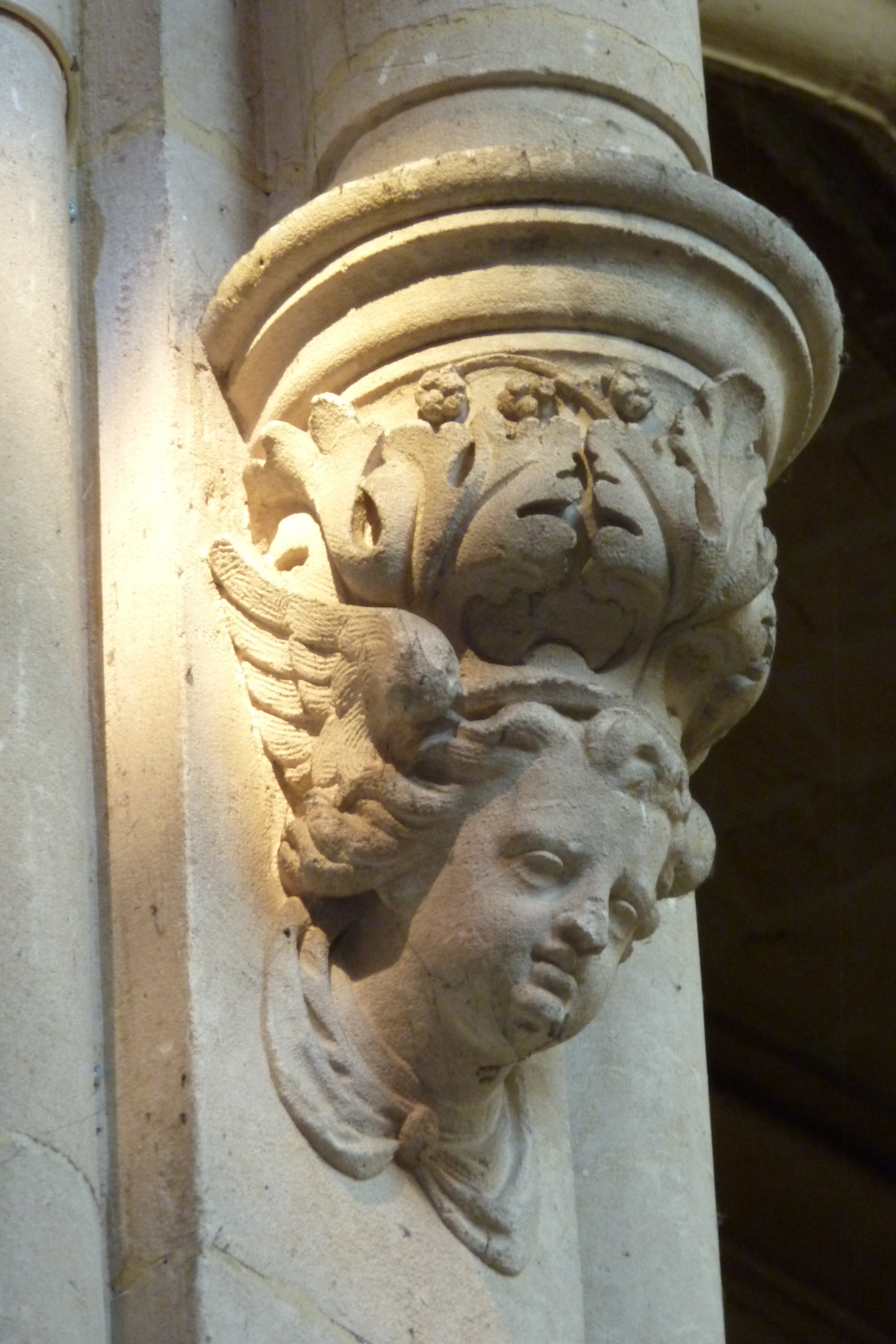 Kirche Saint-Leu-Saint-Gilles in Paris, Konsole mit Engelkopf